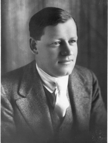 he:אדוארד קית'-רוץ'